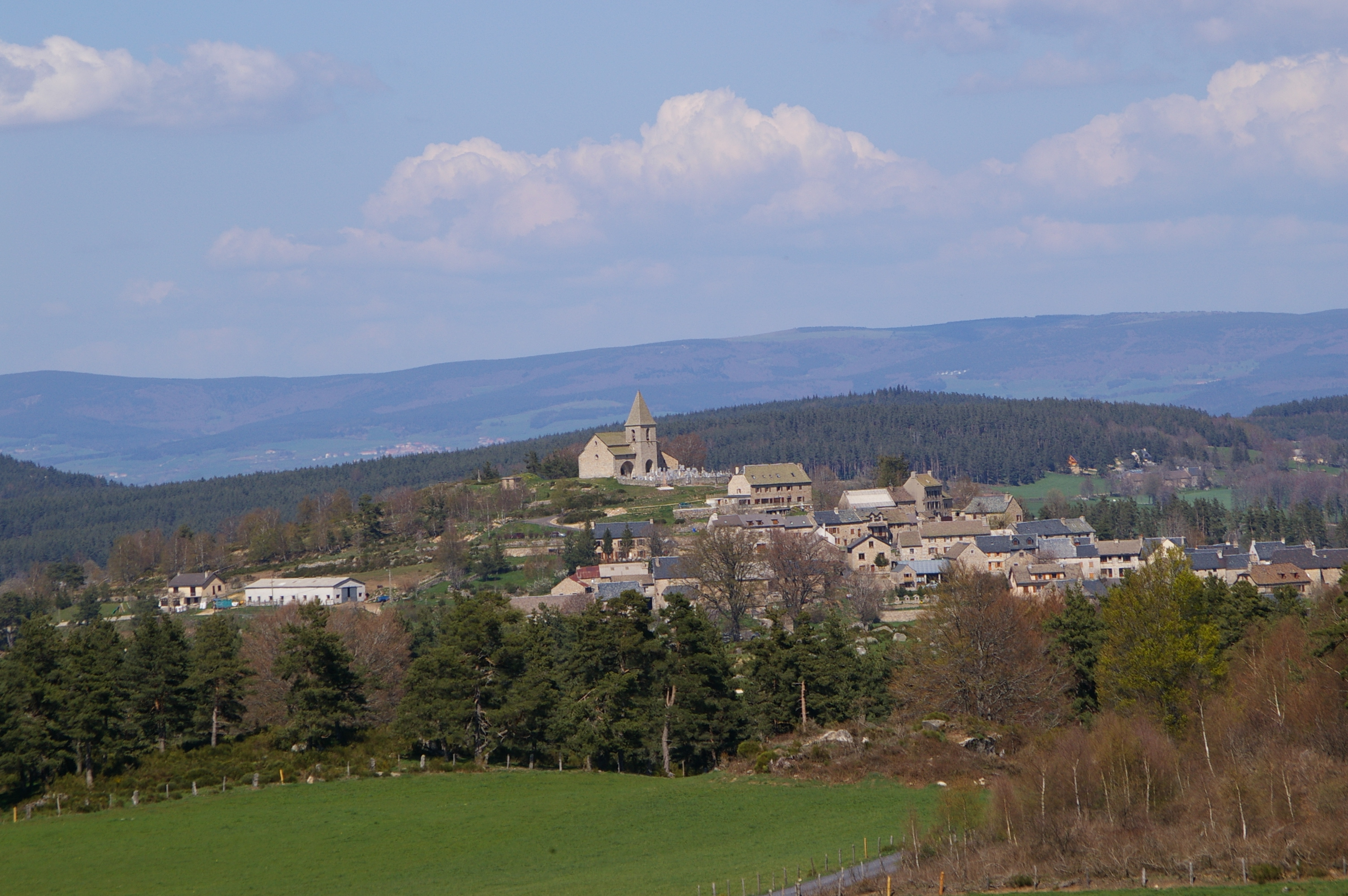 vue générale de TERMES LOZERE